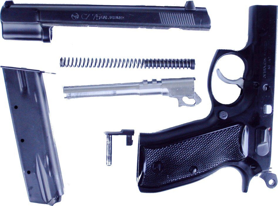 Pistole CZ75 Hauptbaugruppen (selbst aufgenommen, FDL) Verschluss Rückholfeder Lauf mit Verriegelungsrillen Griffstück mit Abzugsmechanik und Spannhahn Magazin